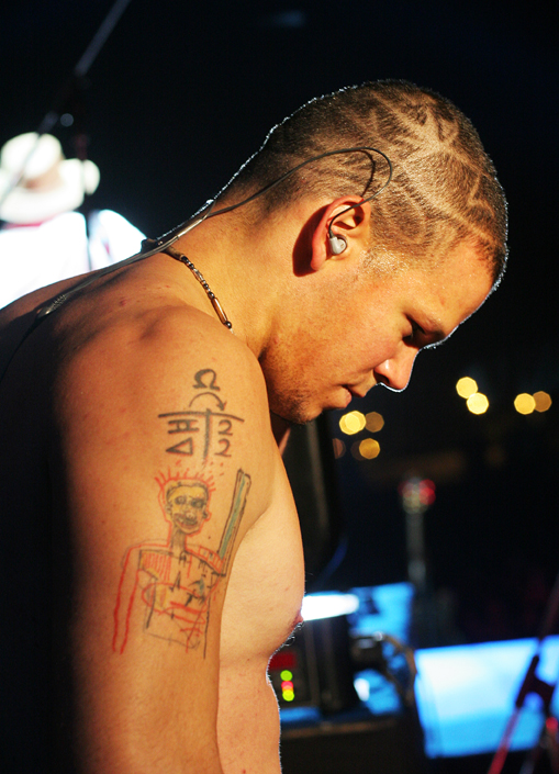 Calle 13 singer- segundos antes de volver a salir a cantar. un hit